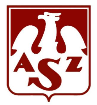 AZS UMK Toruń symbol klubu